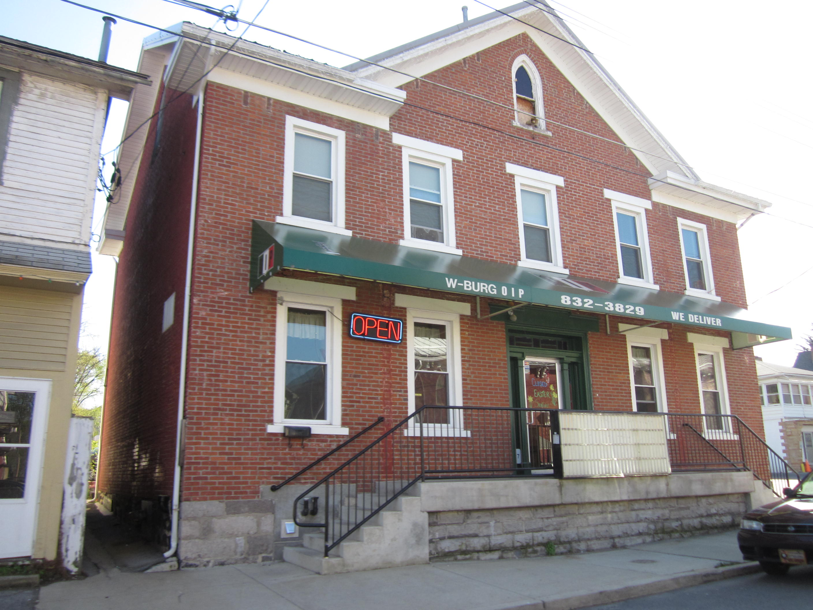 Williamsburg, Pennsylvania